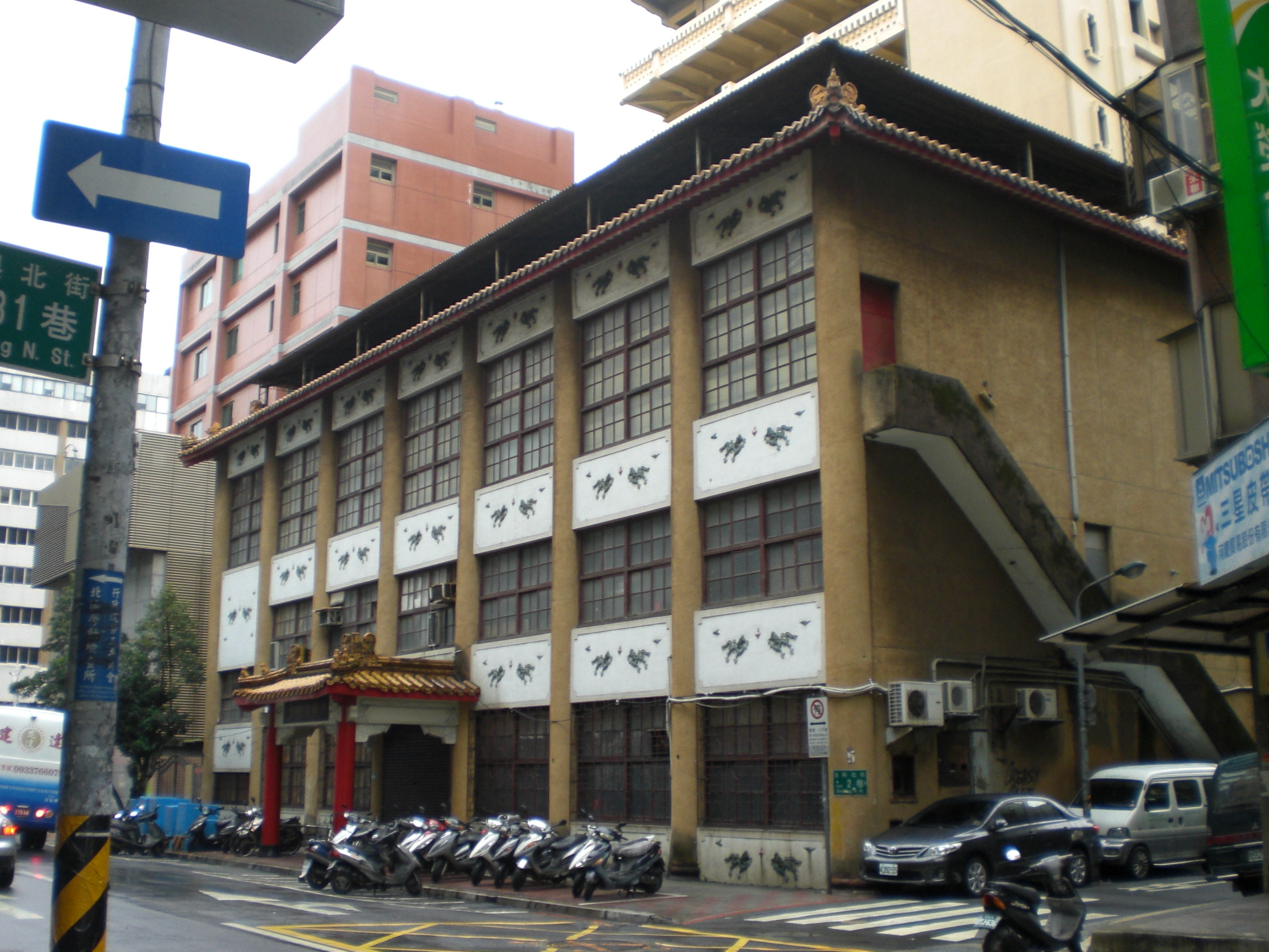 中國佛教會總會，位於臺灣臺北市中正區紹興北街6號。